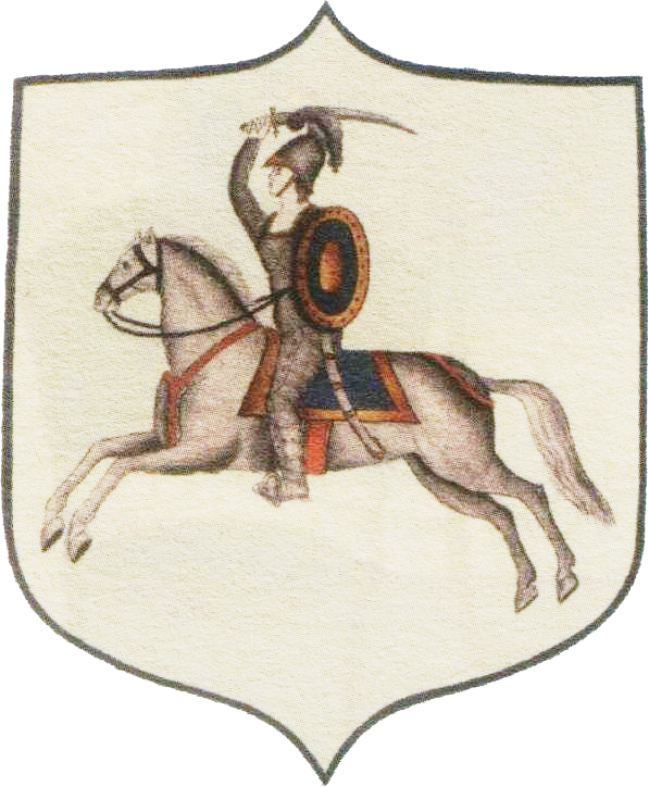 Беларуская (тарашкевіца): Полацак (Połacak). Герб места і павету з Пагоняй (Pahonia)